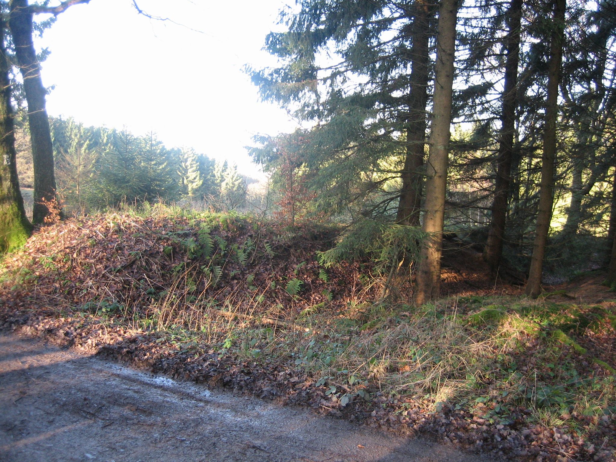 Schutzwall (Landwehr) zwischen Wellin und Welliner Baum. Bodendenkmalliste Herscheid Nr. 1